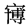 博物館的合字